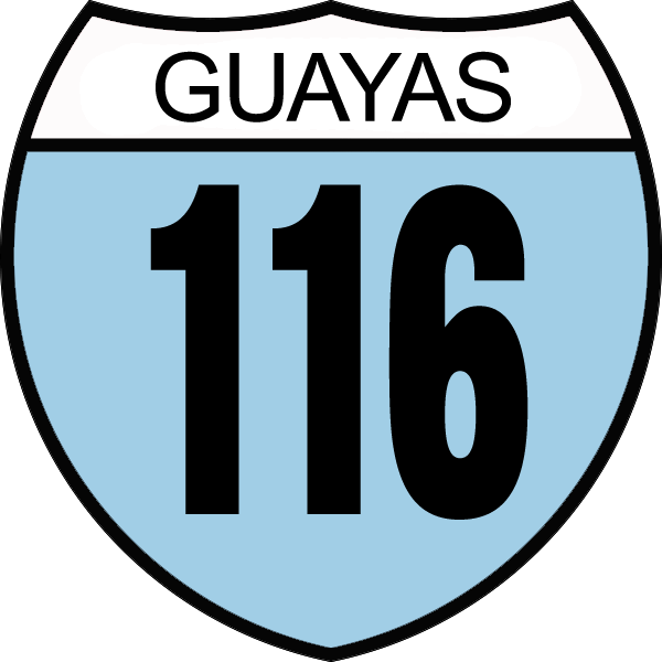 Disco de Identificación Vía Provincial Guayas 116